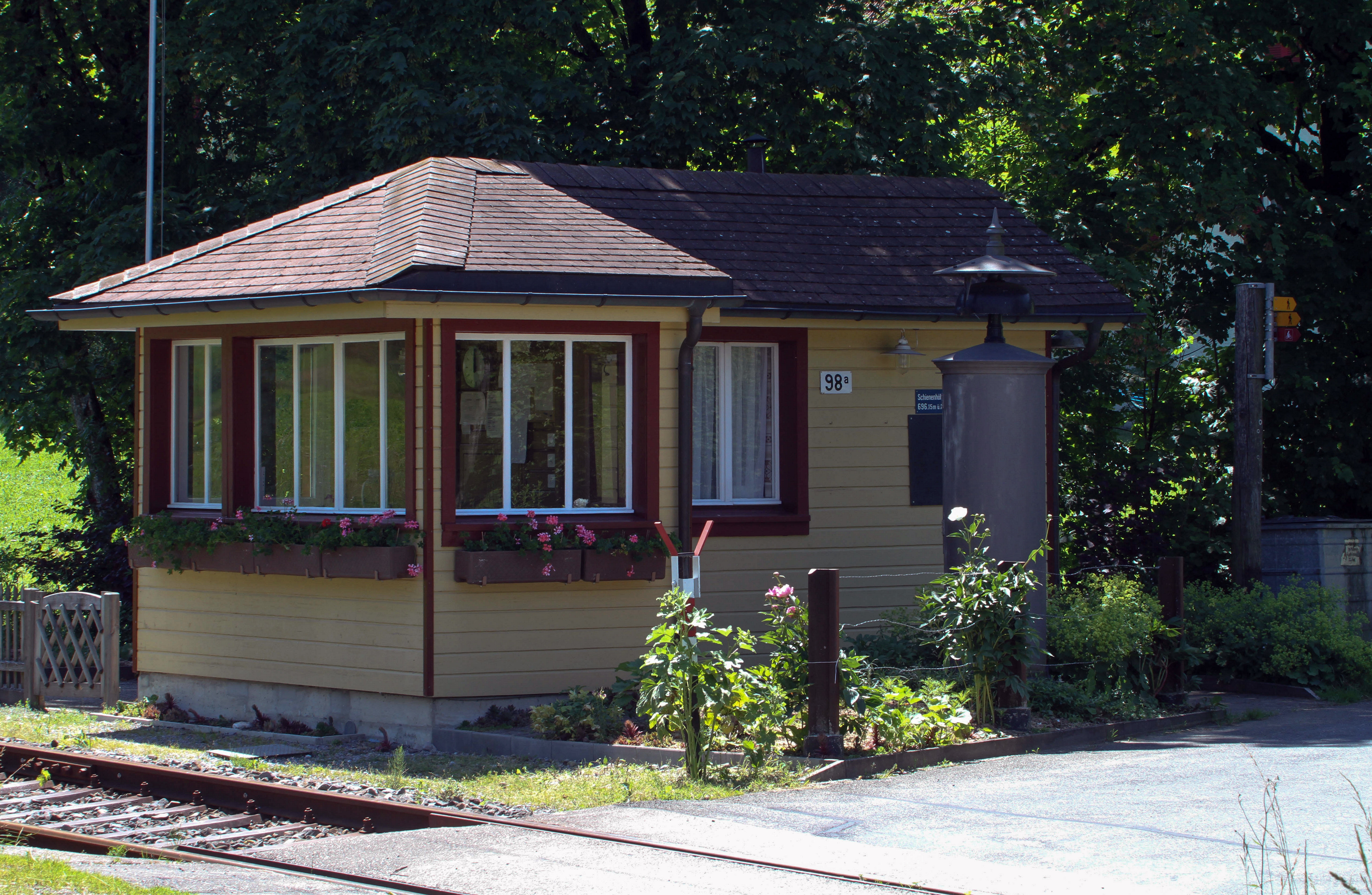 altes Stellwerk Neuthal (DVZO)